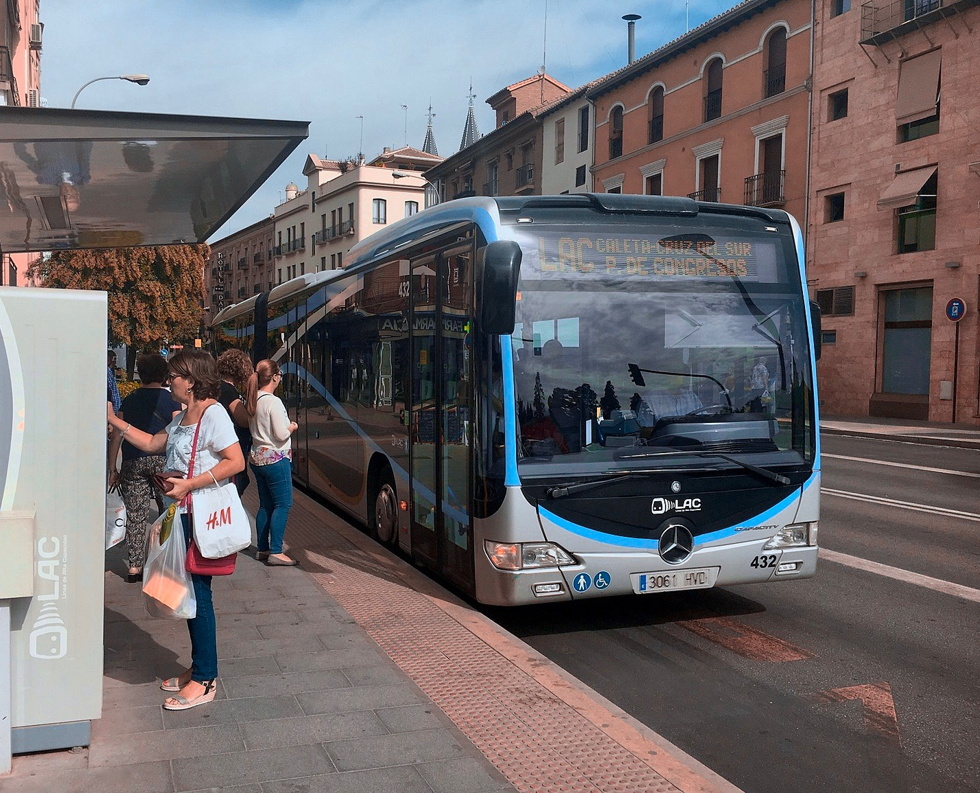 Línea de Alta Capacidad de Granada en la parada de Puente Blanco